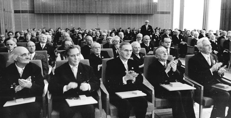 ADN-ZB Katscherowski 26.2.1975 Berlin: Auszeichnung Bei einer festlichen Veranstaltung ehrte am 26.2.1975 der Vorsitzende des Staatsrates der DDR, Willi Stoph, Mitglied des Politbüros des ZK der SED, in seinem Amtssitz verdiente Persönlichkeiten mit hohen staatlichen Auszeichnungen. Dazu gehörten u.a. Dr. Paul Wandel, Prof.em. Dr. Peter-Alfons Steiniger, Dr. Siegfried Dallmann, Prof. Dr. Hermann Henselmann, Dr. Gustav von Wangenheim (1.Reihe v.r.n.l.). (Funktionenen s. ADN-Meldg.)